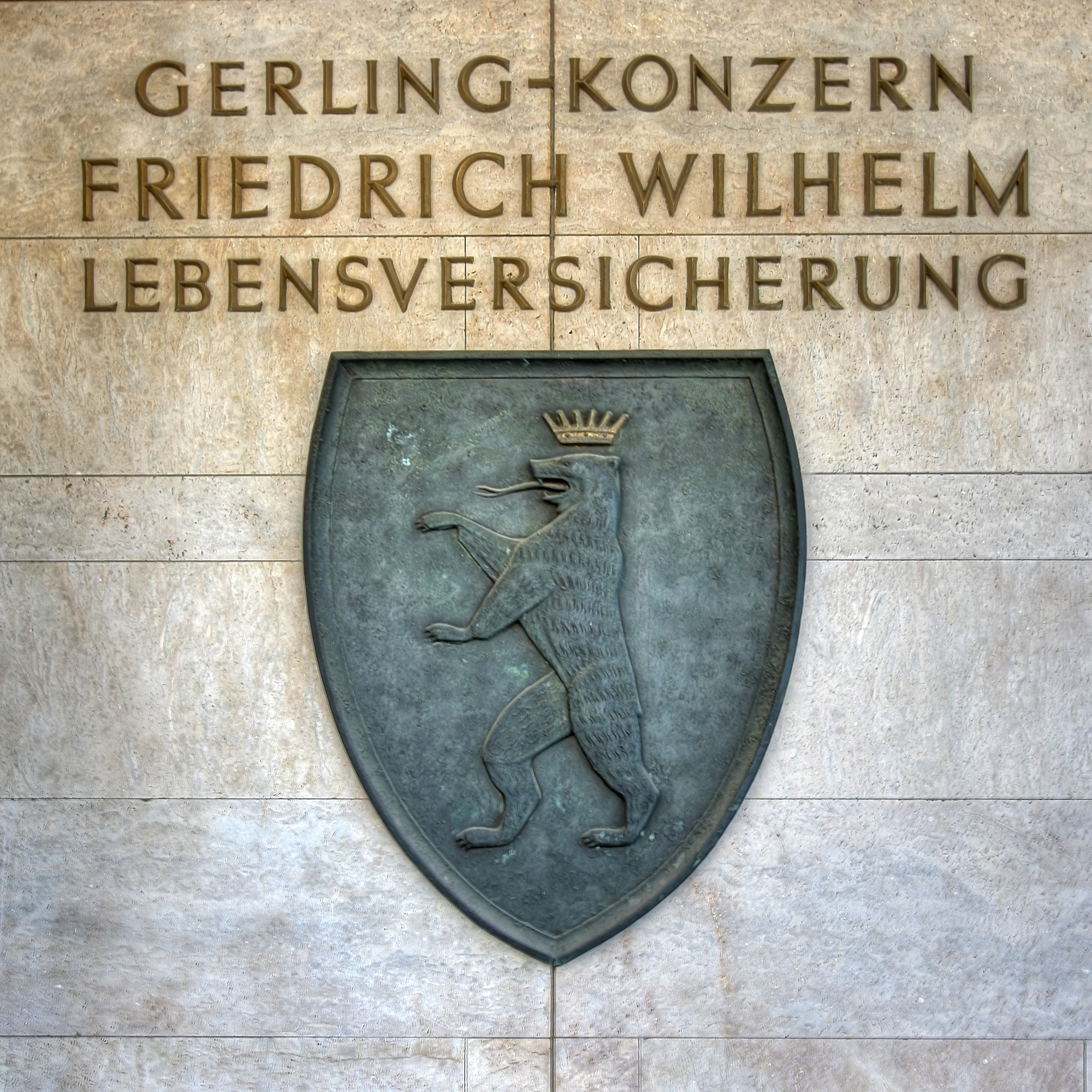 Gebäude des Gerling-Konzerns im Kölner Gereonviertel: Wappen der Friedrich Wilhelm Lebensversicherung außen am Eingang des südlichen Hauptgebäudes in der Straße „Gereonshof“.